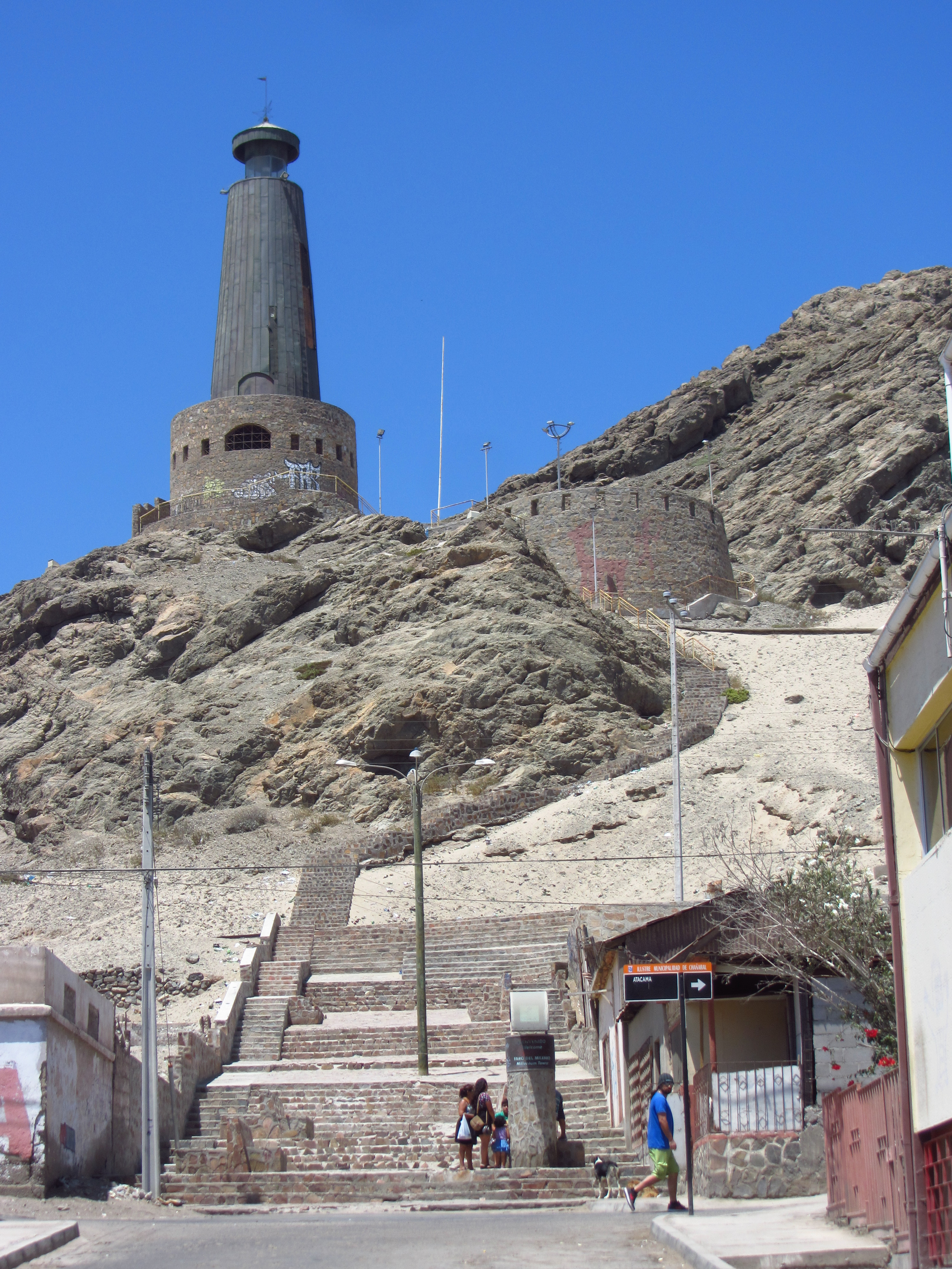 Faro Monumental de Chañaral Región de Atacama, Chile Febrero de 2016